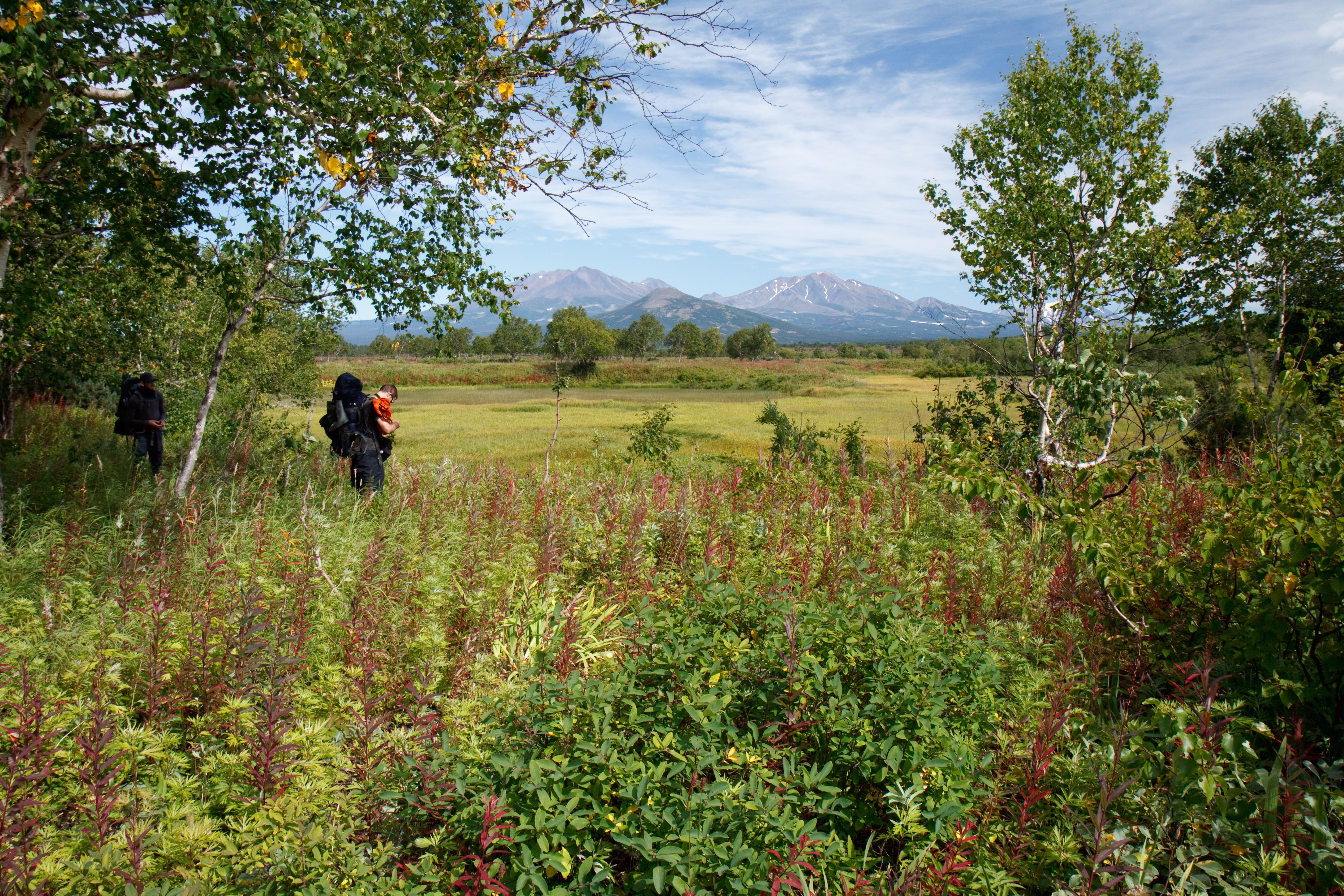 Lesotundra